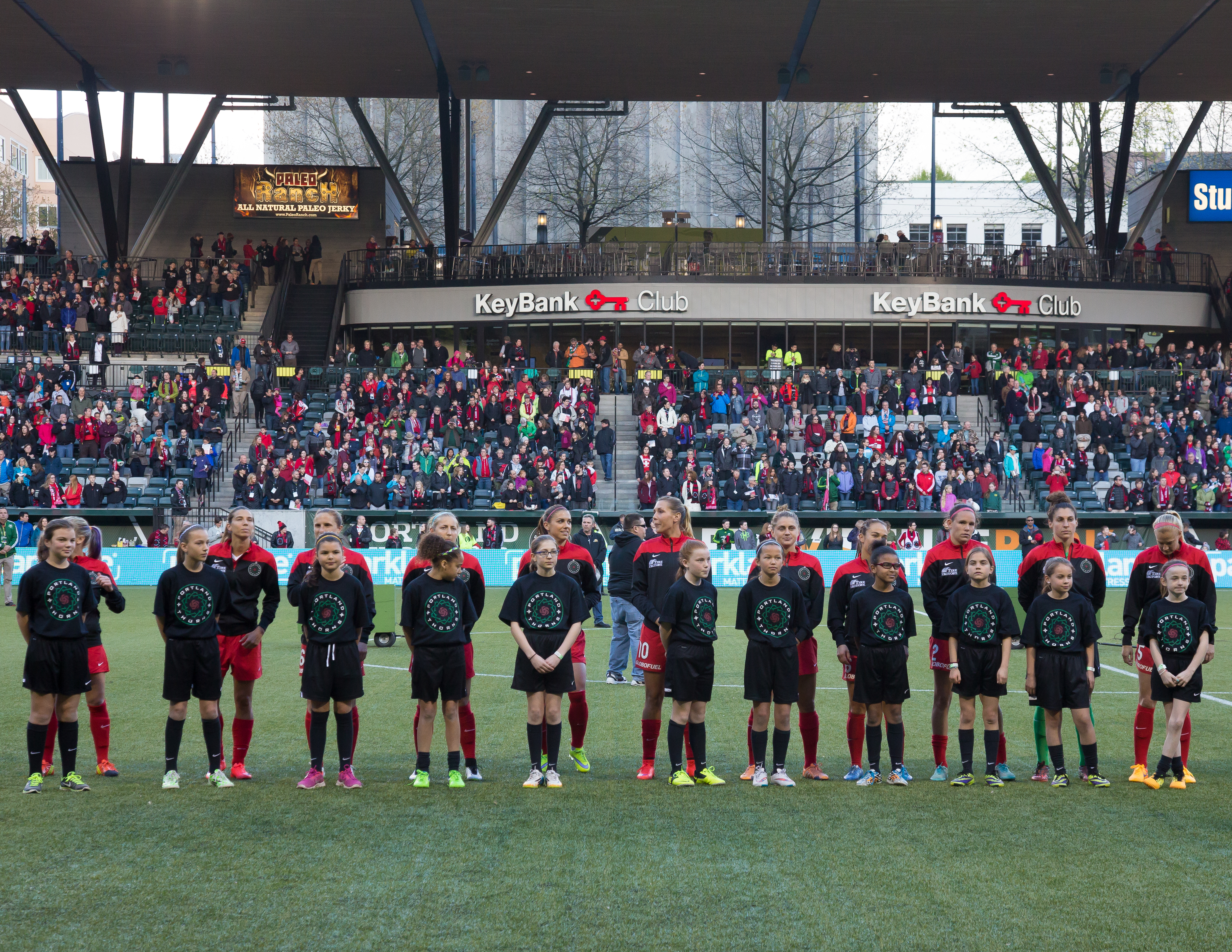 N42A2204